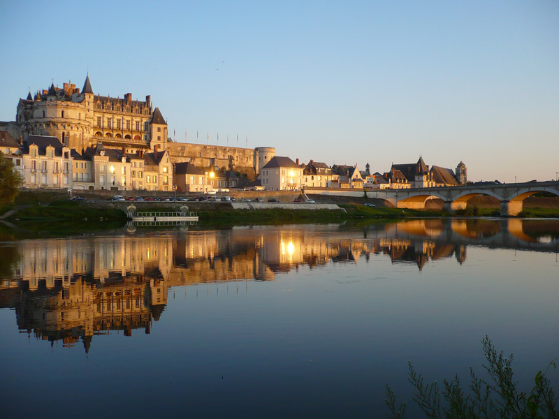 Il s'agit du château d'Amboise surplombant la Loire à Amboise dans le département d'Indre-et-Loire. Il fait partie des châteaux de la Loire.